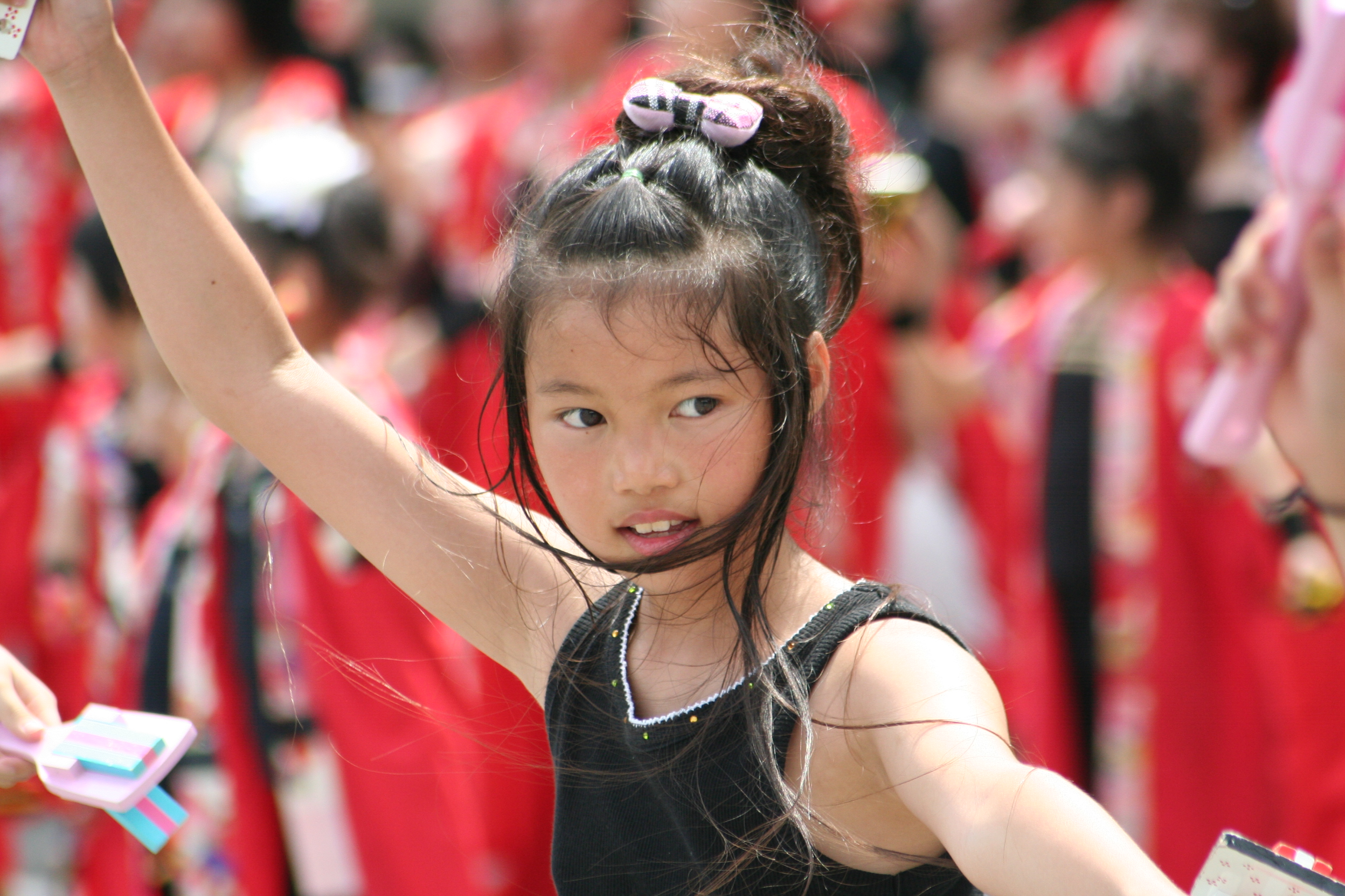 相生ペーロン祭。兵庫県相生市にて毎年開催される祭。2009年7月11･12日の2日間にかけて行なわれた祭の2日目の様子。